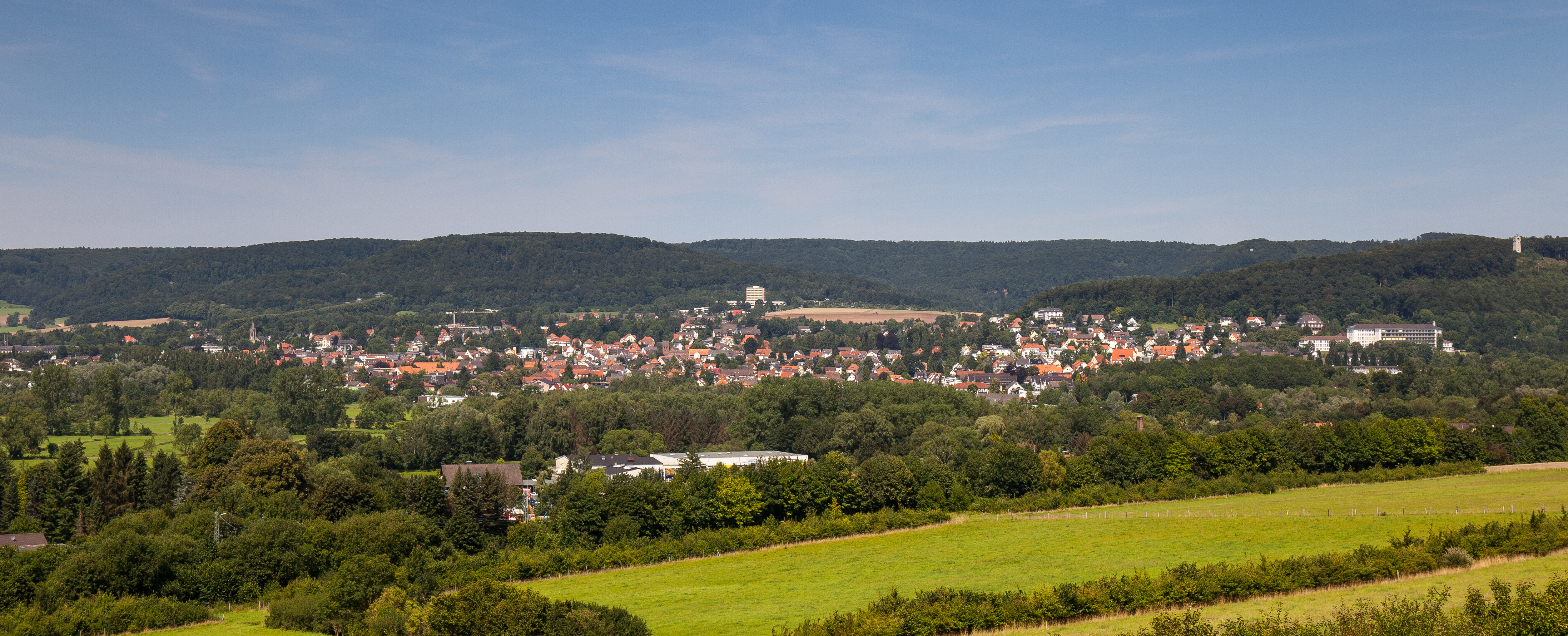 Panorama der Stadt Bad Pyrmont im Landkreis Hameln-Pyrmont in Niedersachsen (Deutschland).